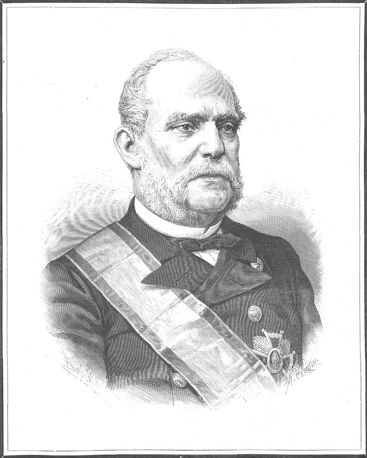 Retrato de Juan Bautista Topete, en la revista española La Ilustración Española y Americana.